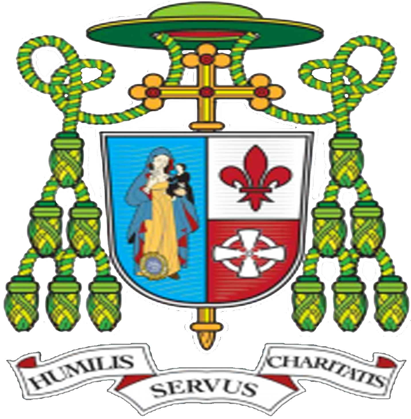 Escudo episcopal de Monseñor Rafael Valdivieso Miranda Obispo de Chitré